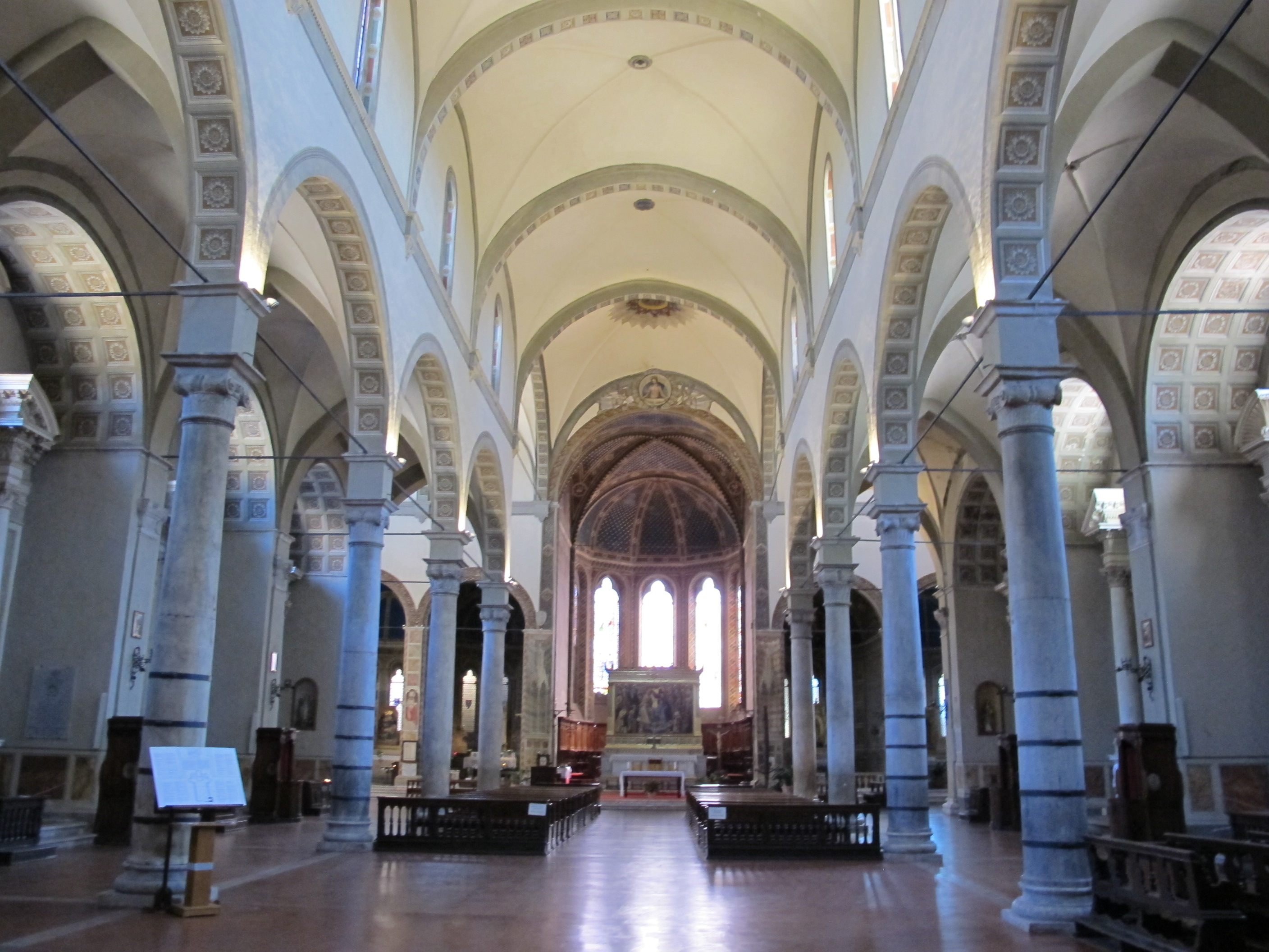 Basilica dei servi, siena